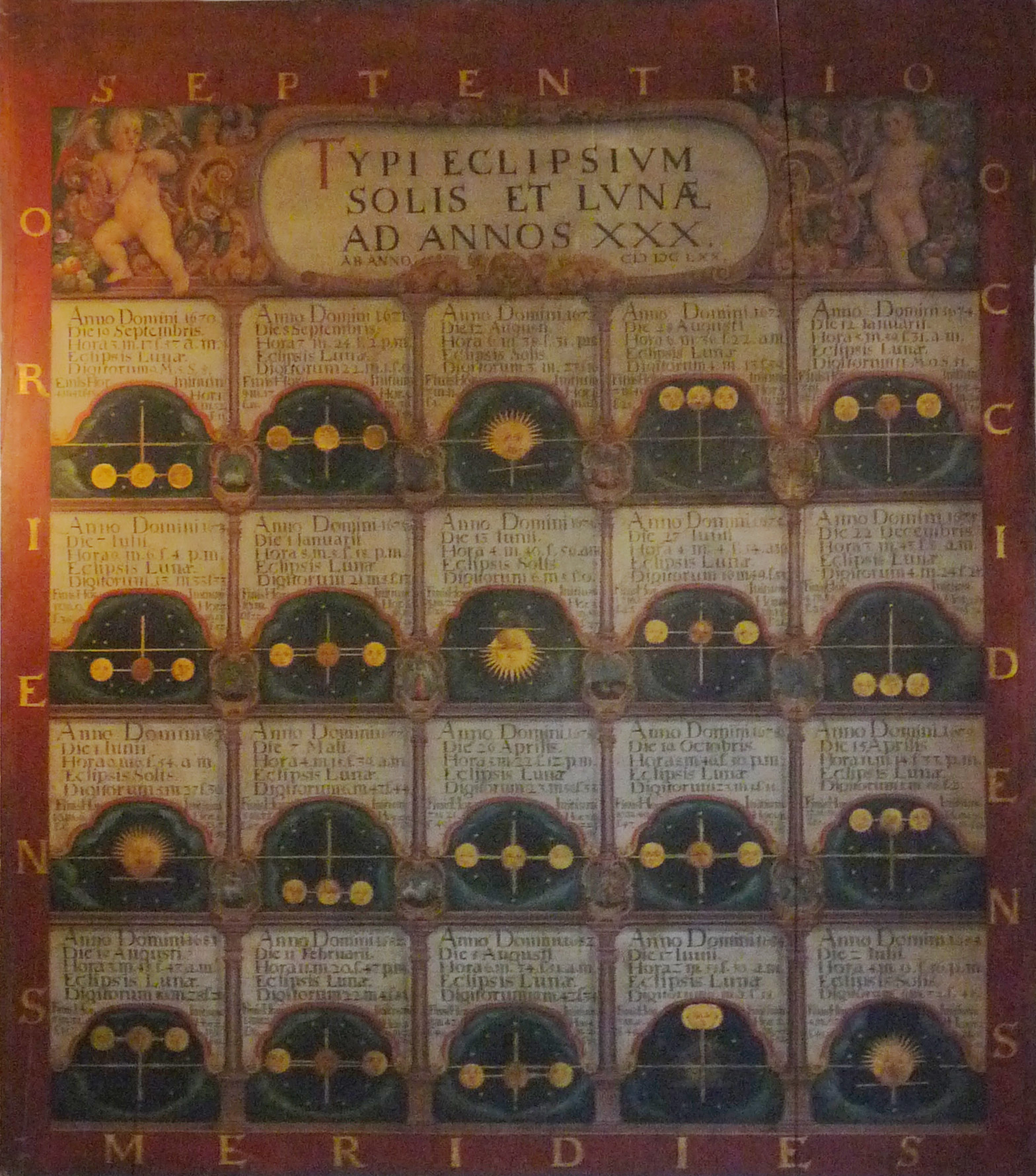 Palais Rohan (Strasbourg). Musée des Arts décoratifs, salle d'horlogerie (n° 14). Tableau des éclipses de soleil et de lune.